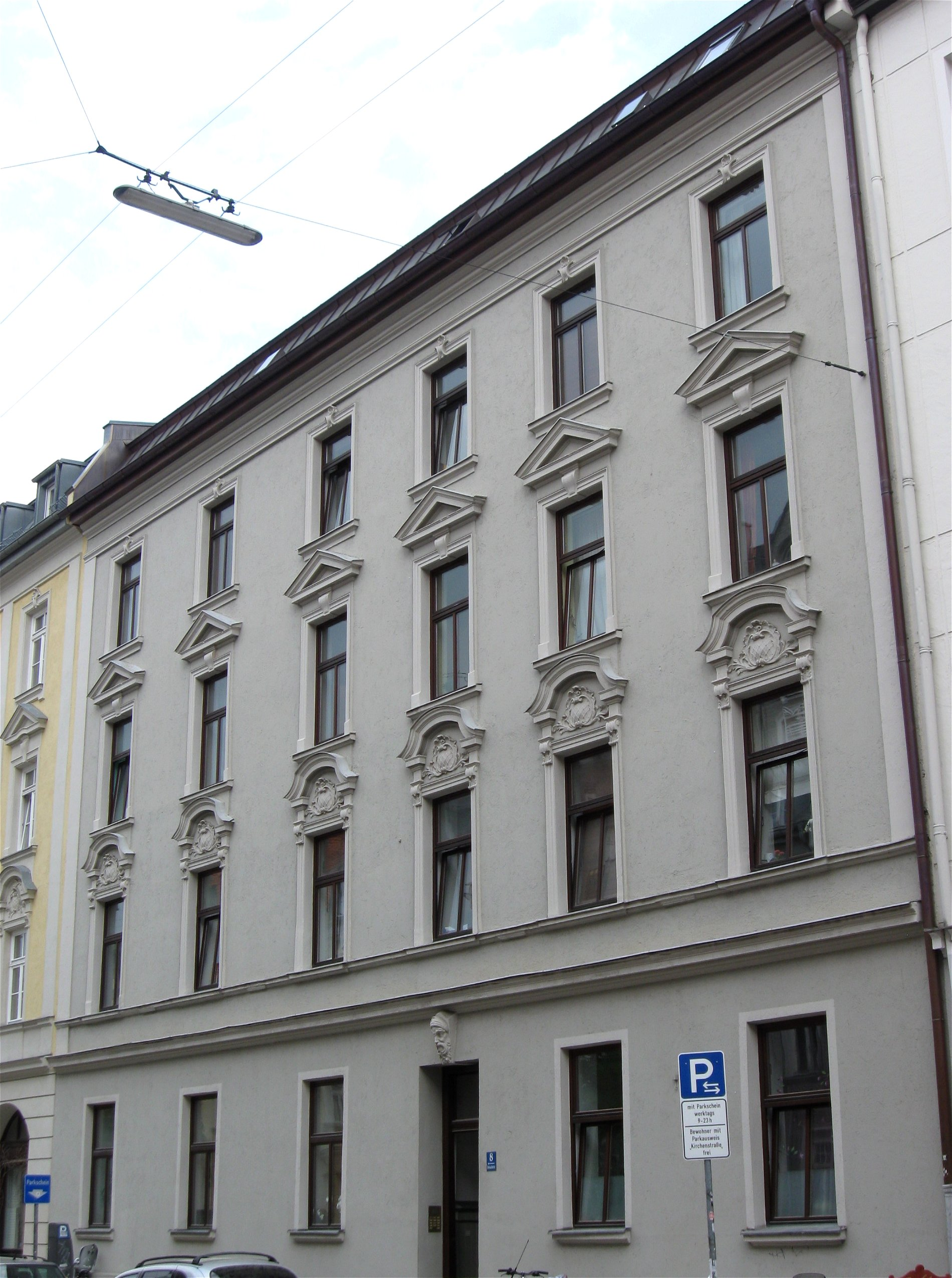 Breisacher Straße 8; Mietshaus, neubarock, reich stuckiert, 1897 von Hans Thaler